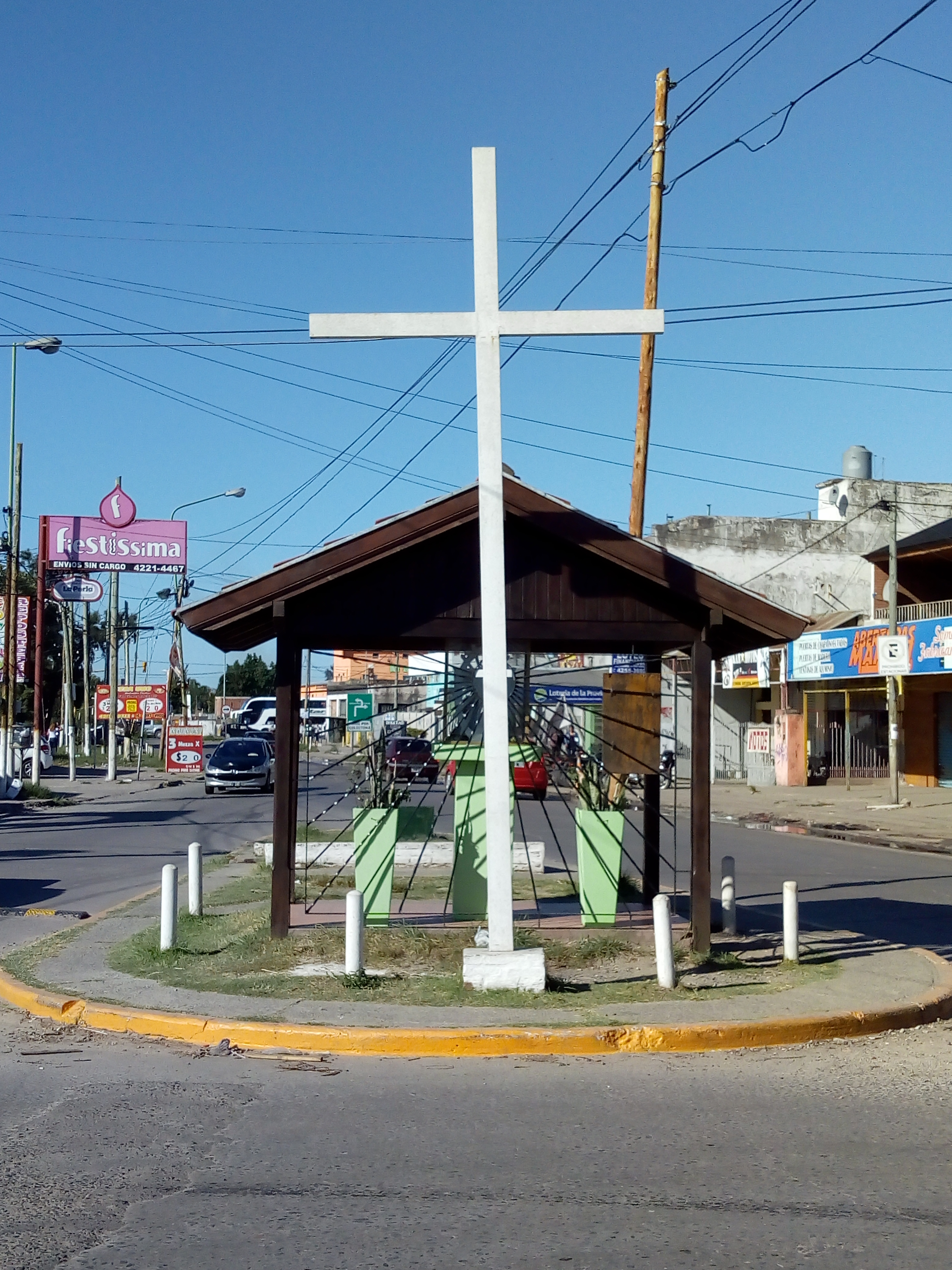 Altar en Avenida Luján Bosques